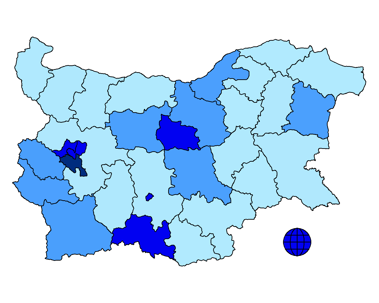 Гласуване по райони за Демократи за силна България на парламентарните избори през 2005. Всеки от цветовете съответства на приблизително 1/4 от подадените гласове (по около 59 хиляди гласа) По тъмният цвят съответства на получен по-голям процент от гласовете, както следва: 18% (най-тъмен цвят) 6-17% 5-6% 1-5% (най-светъл цвят)